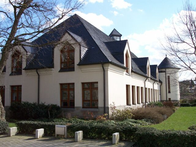 Bild aus Bochum, selbst aufgenommen, GFDL